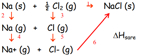 Born-Haber zikloa NaCl